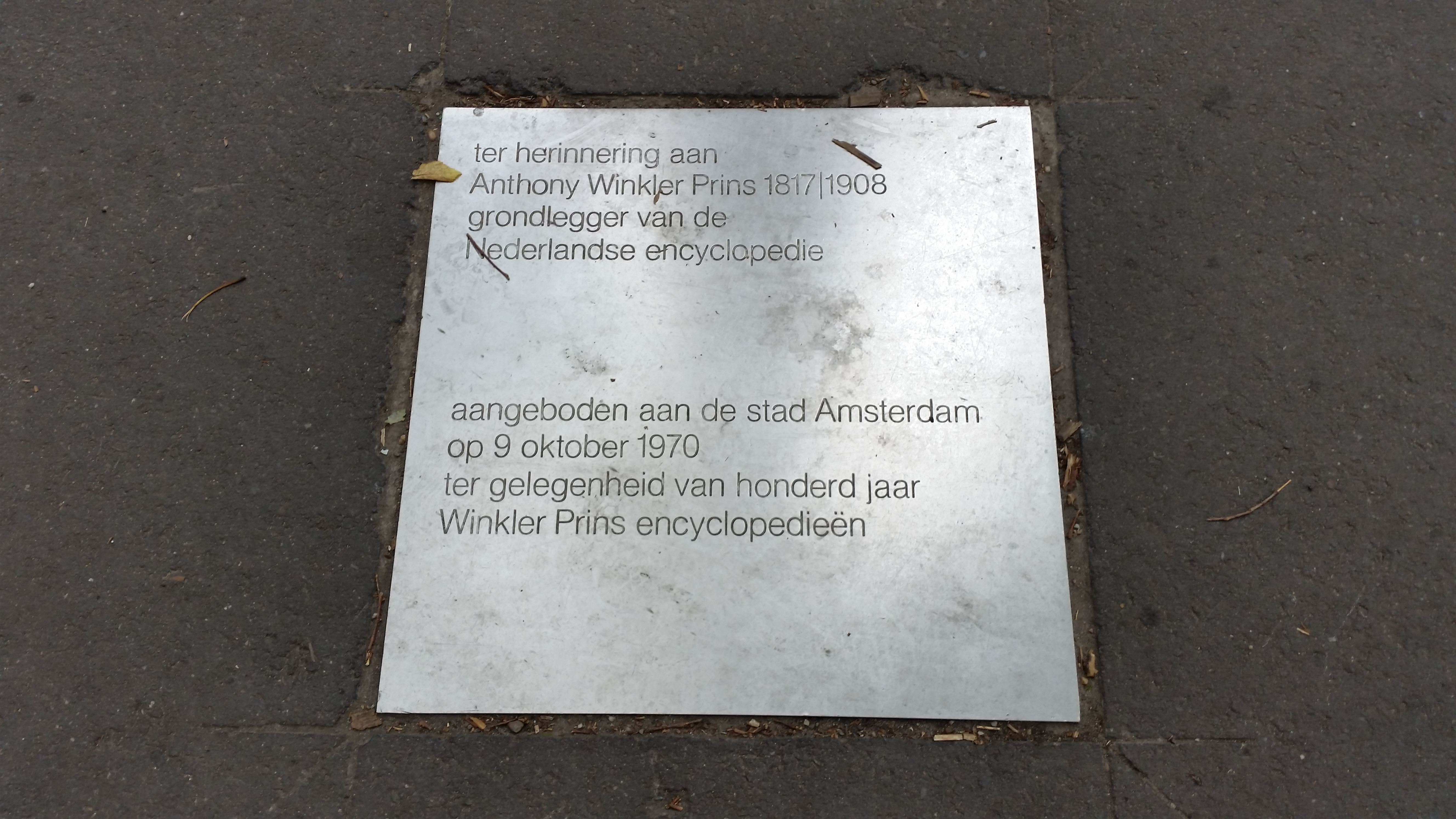 Ter herinnering aan Anthony Winkler Prins, plaquette